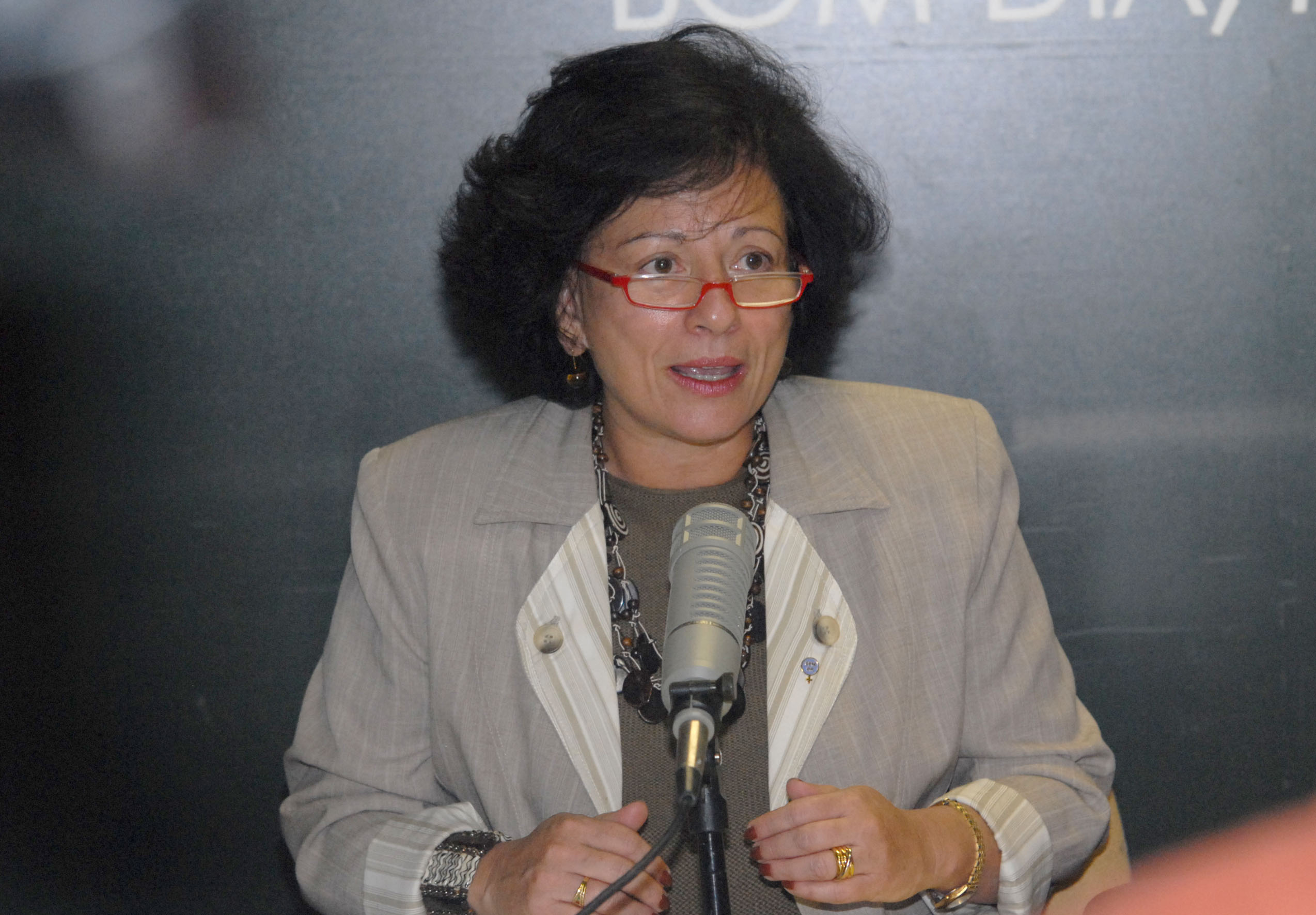 Nilcéia Freire, ministra da Secretaria Especial de Políticas para as Mulheres, no governo Lula